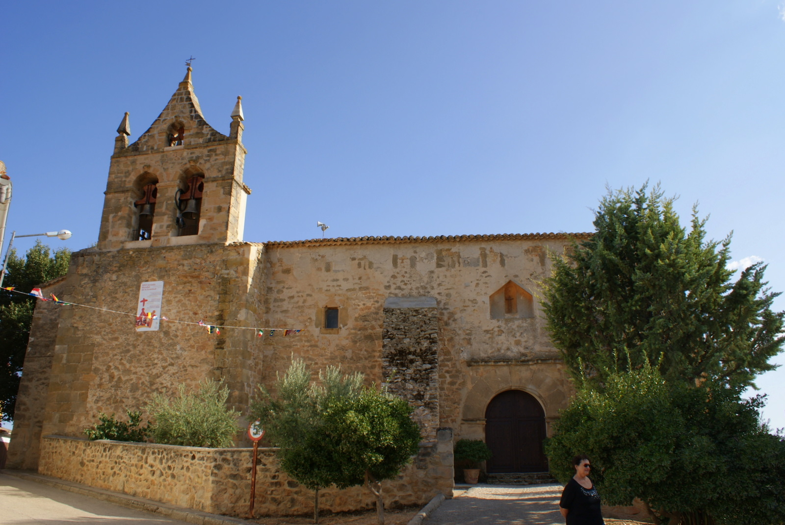 También en la fachada norte encontramos una puerta con arco de medio punto, sobre la que vemos una hornacina con un cristo y en lo alto el campanario de espadaña. S. XVI Iglesia de Nuestra Señora de la Asunción. Albendea, Cuenca, Castilla-La Mancha